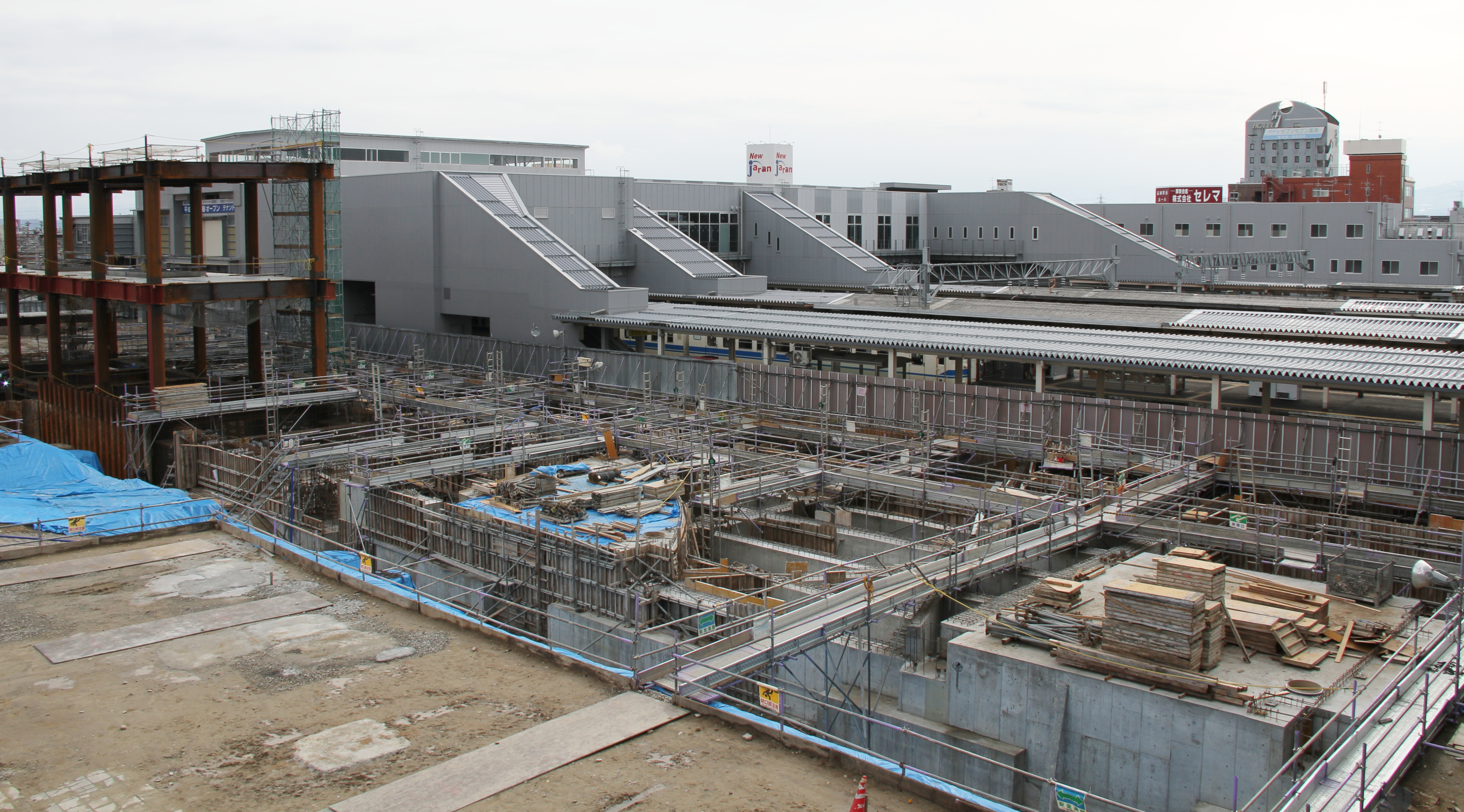 Takaoka Station